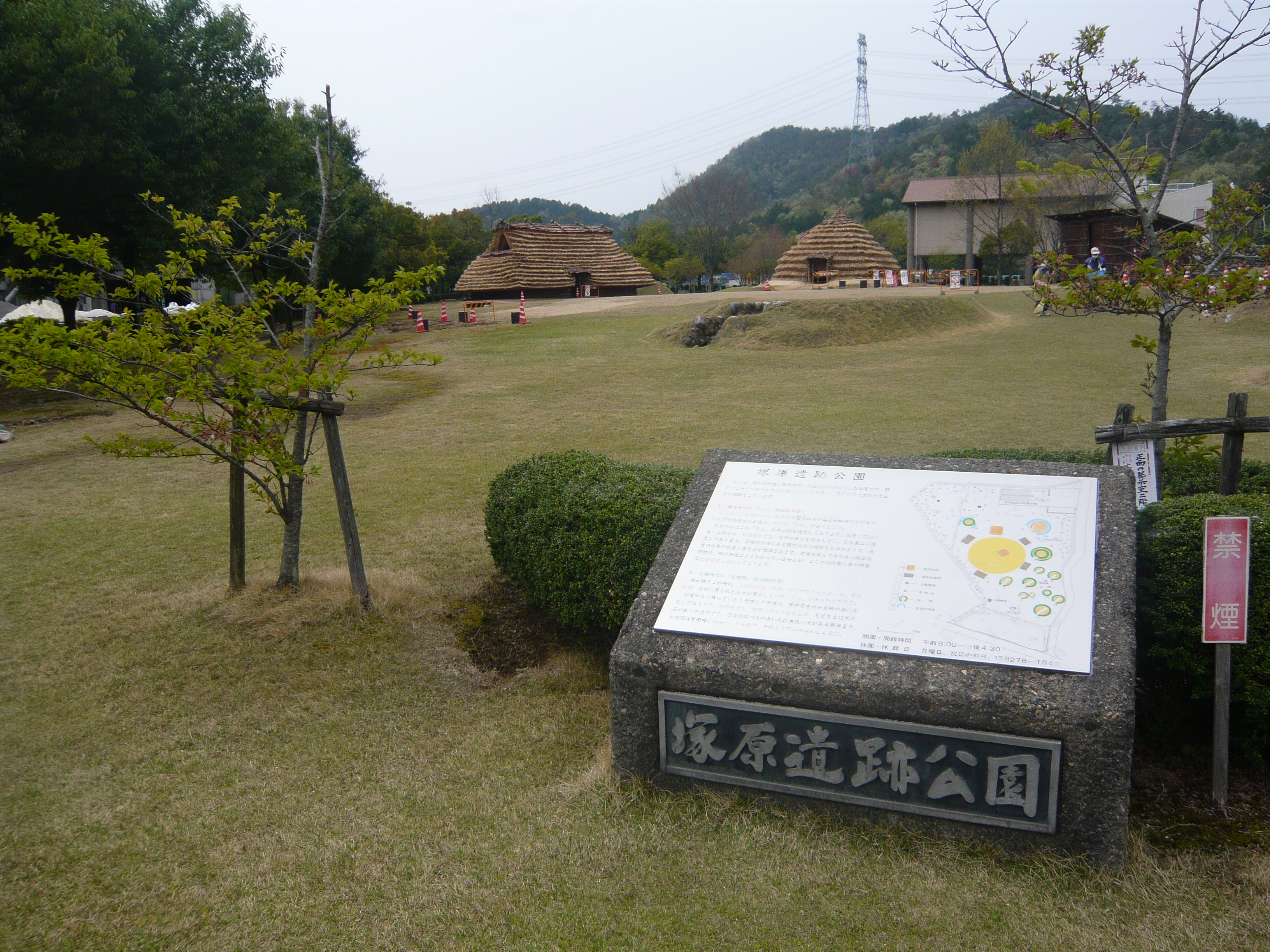 Tsukahara Ruins Park （塚原遺跡公園）,Seki,Gifu,Japan（岐阜県関市）で撮影。